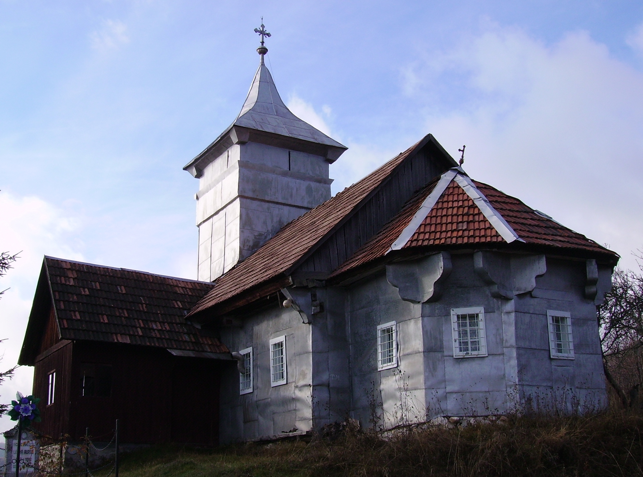 Biserica de lemn din satul Sălătruc, cătunul Obârșa, județul Hunedoara